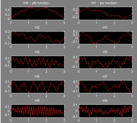 Legendre (legd2) Wavelet Packets W system functions